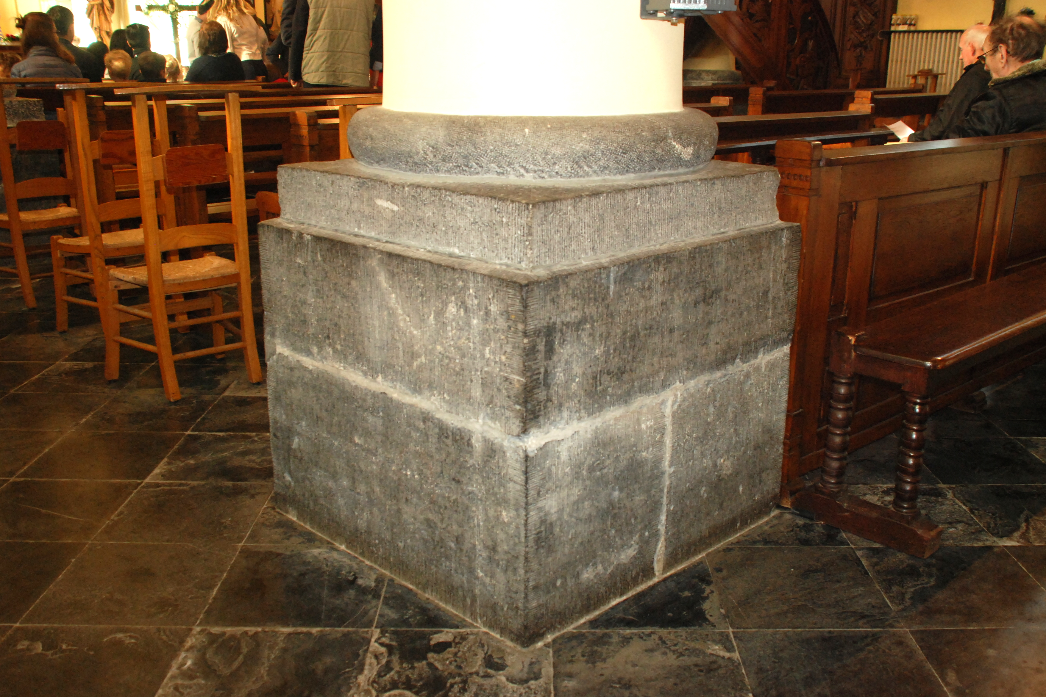 Belgique - Brabant wallon - Mont-Saint-Guibert - Église Saint-Guibert